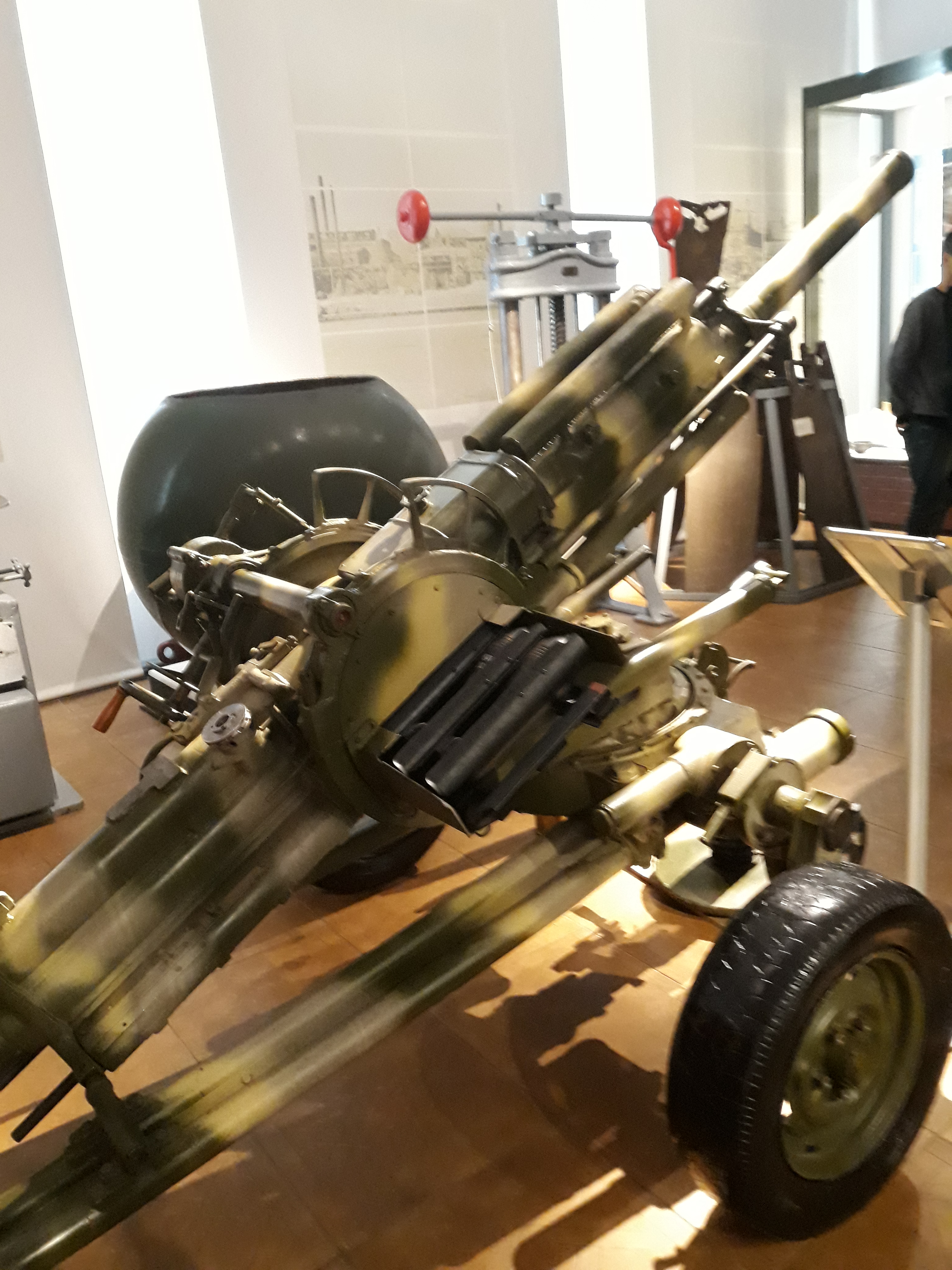 Музей Обуховского завода. Автоматический миномёт 2Б-9 "Василёк" , 82 калибр. Разработка начата в 1967 году. Разработан Московским КБ транспортно-химического машиностроения под руководством Филиппова В.К. Доработка конструкции и серийное производство - завод "Большевик", вед.конструктор Бурденюк А.Е., технолог Жирнов В.Н.. Технические характеристики: Масса 632 кг Время перевода из боевого положения в походное и обратно 1,5 мин Максимальная дальность стрельбы 4270 м Радиус действительного поражения 18 м Скорострельность 120 выстрелов/мин Экипаж (расчет) 4 человека Заряжение кассетное по 4 мины Вес мины 3,23 кг Режим стрельбы: одиночный, автоматический